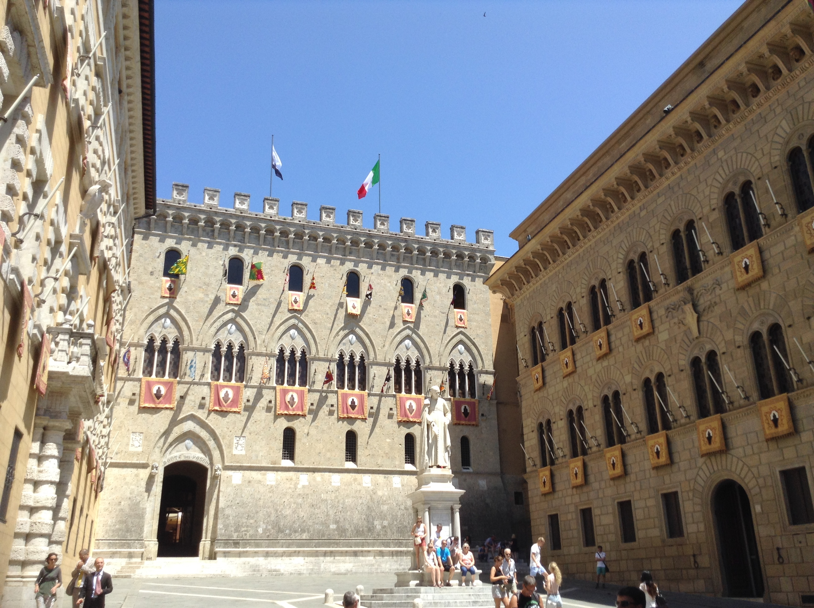 Palazzo Salimbeni imbandierato durante i quattro giorni del palio del 2 luglio 2016